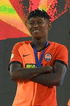 Вітао - бразильський футболіст